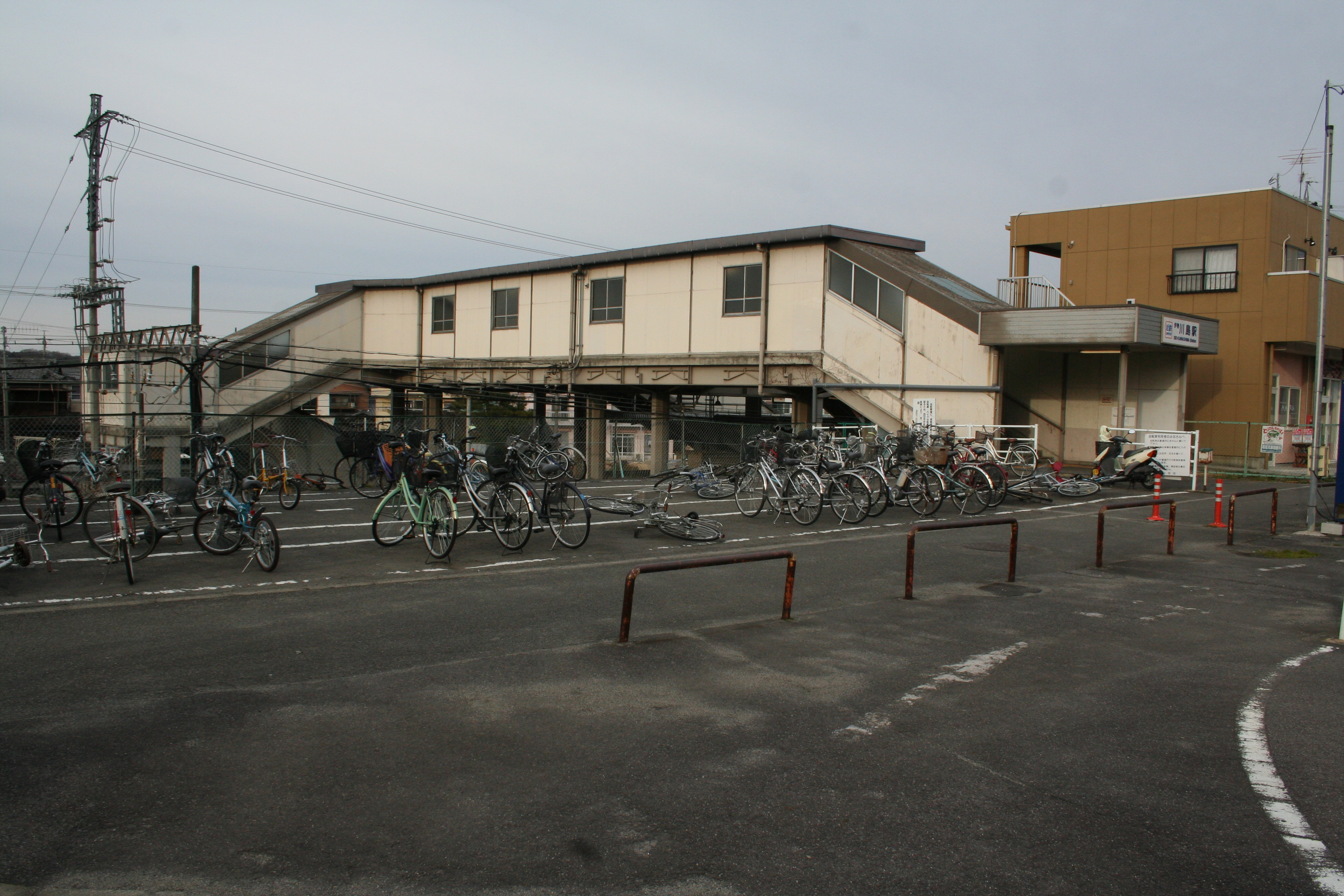 伊勢川島駅